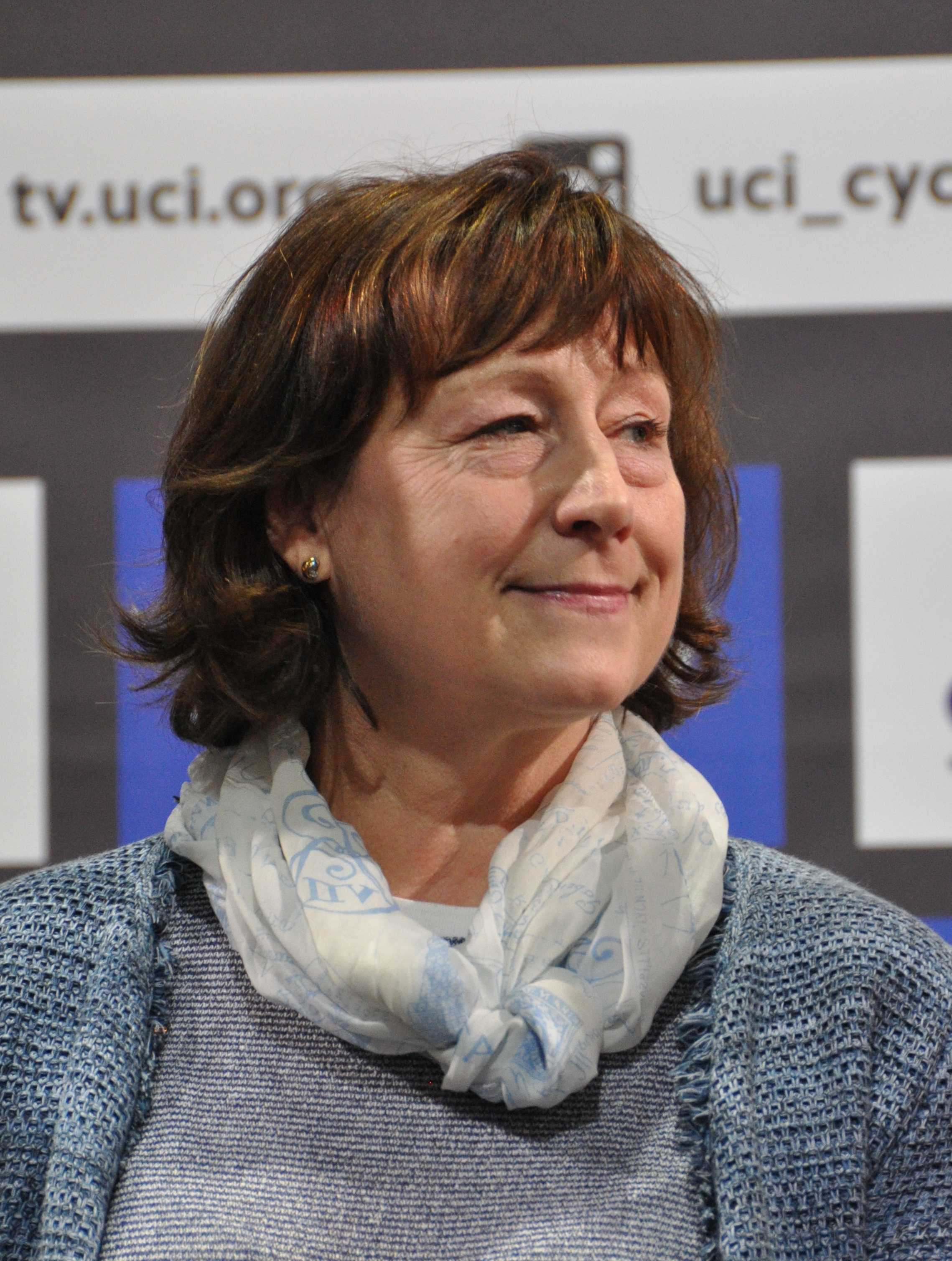 Christa Luding-Rothenburger, ehem. Eisschnellläuferin und Bahnradsportlerin